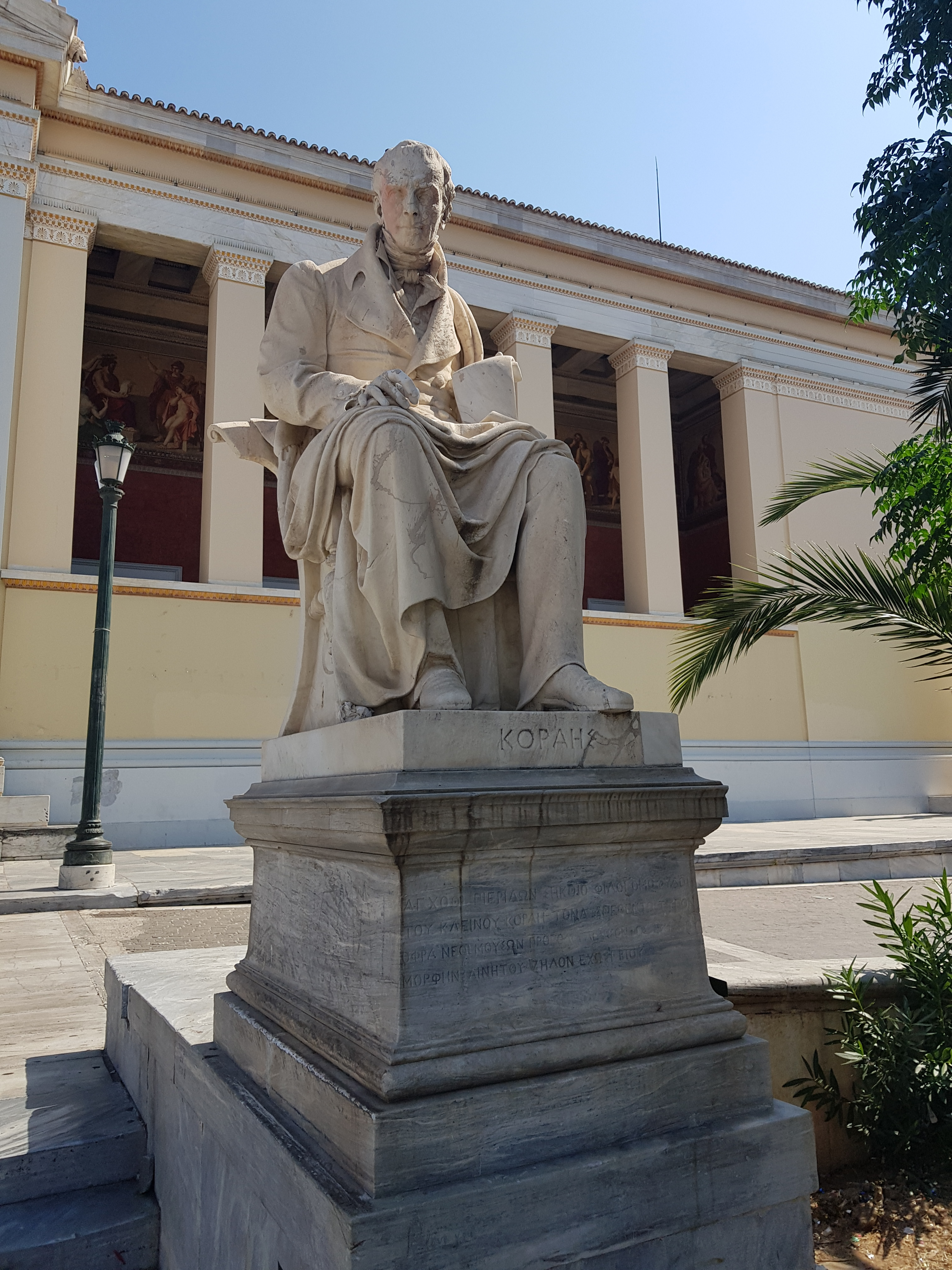 Εθνικό και Καποδιστριακό Πανεπιστήμιο Αθηνών«Κτίριο Εθνικού και Καποδιστριακού Πανεπιστημίου Αθηνών»